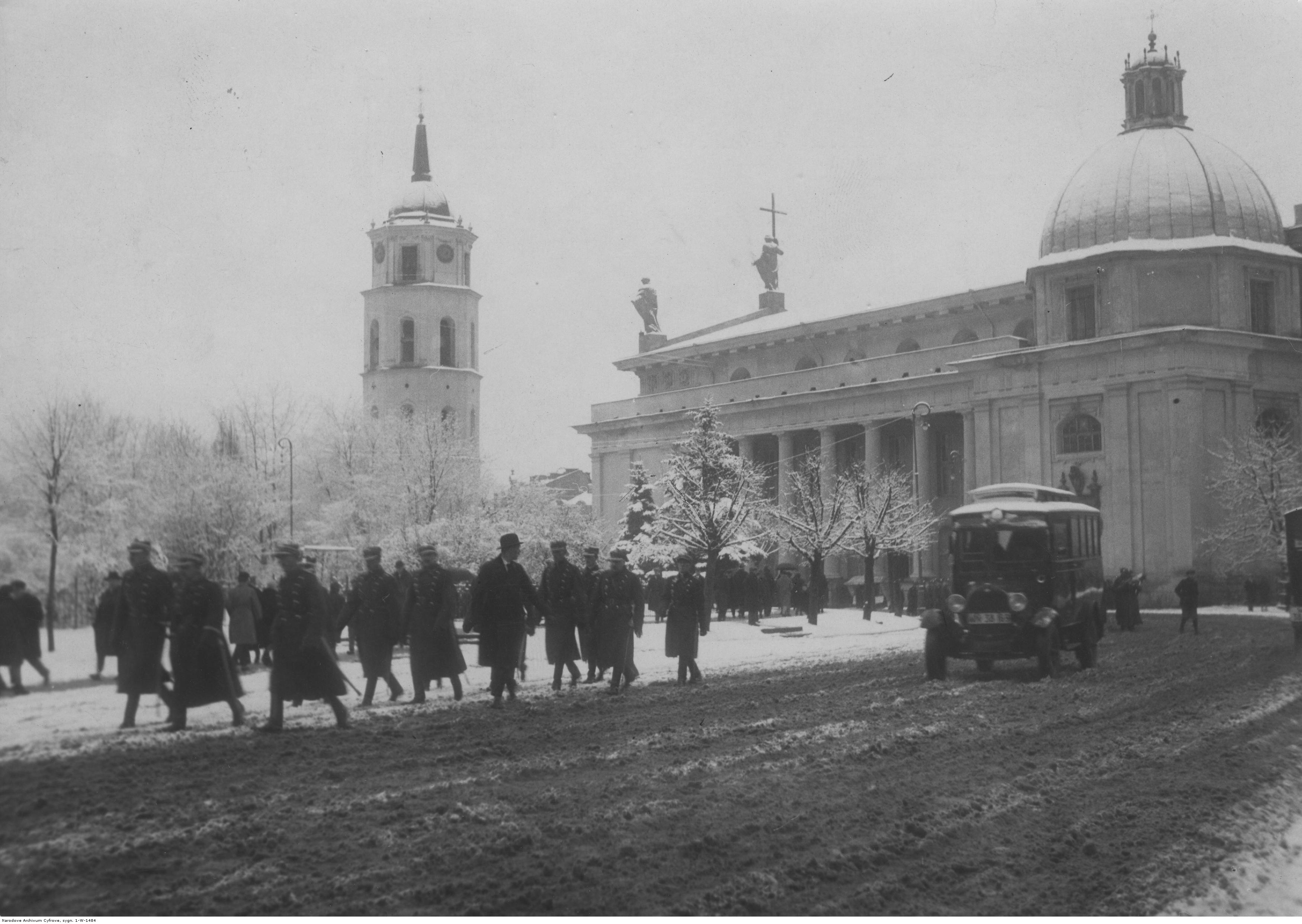 XV -lecie 1 Pułku Artylerii Lekkiej w Wilnie Sztab pułku w drodze po nabożeństwie w katedrze wileńskiej. Koncern Ilustrowany Kurier Codzienny - Archiwum Ilustracji. Sygnatura: 1-W-1484